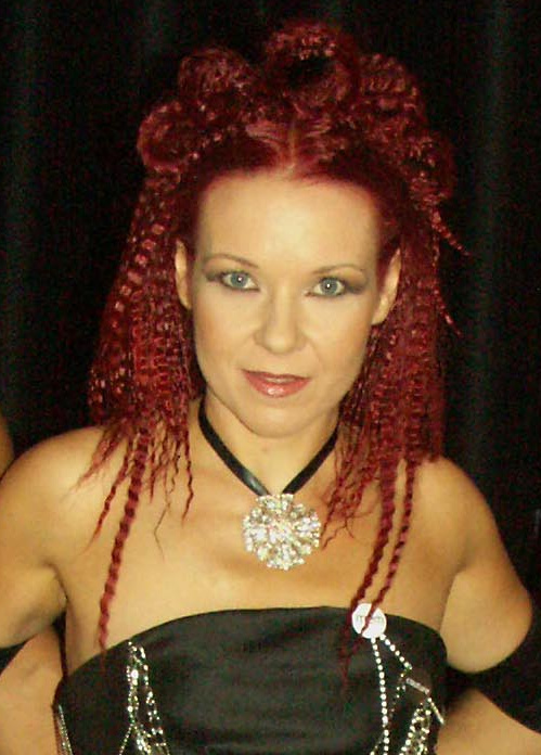 Regina.